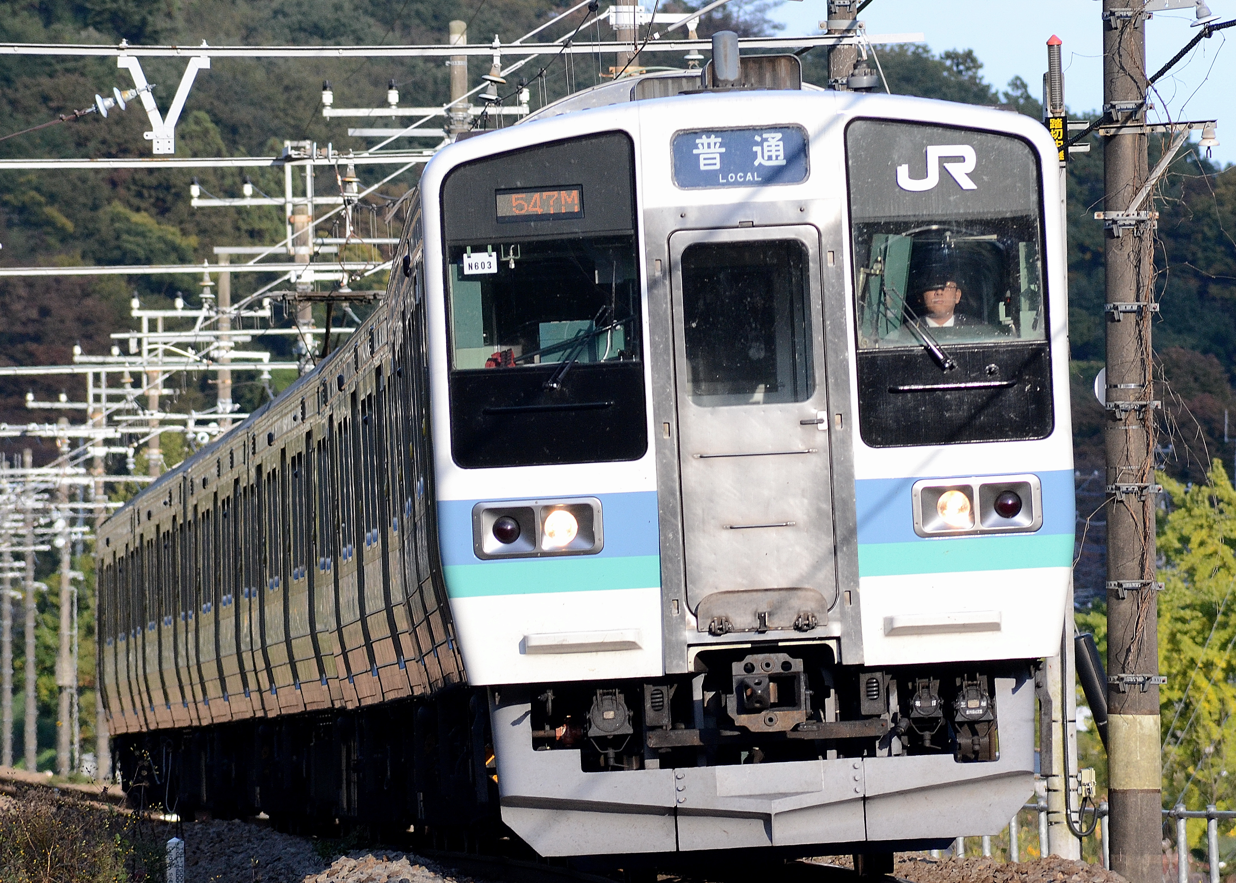 中央東線高尾-相模湖間を走行する、元町田車両センターの211系0・2000番台から改造された、長野総合車両センター所属の6両編成のN603編成（公道から撮影）